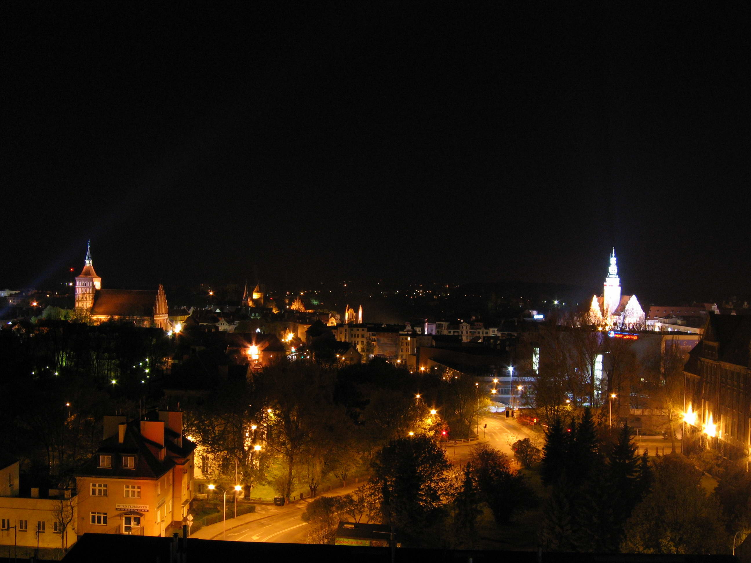 Olsztyn nocą, widok na Stare Miasto